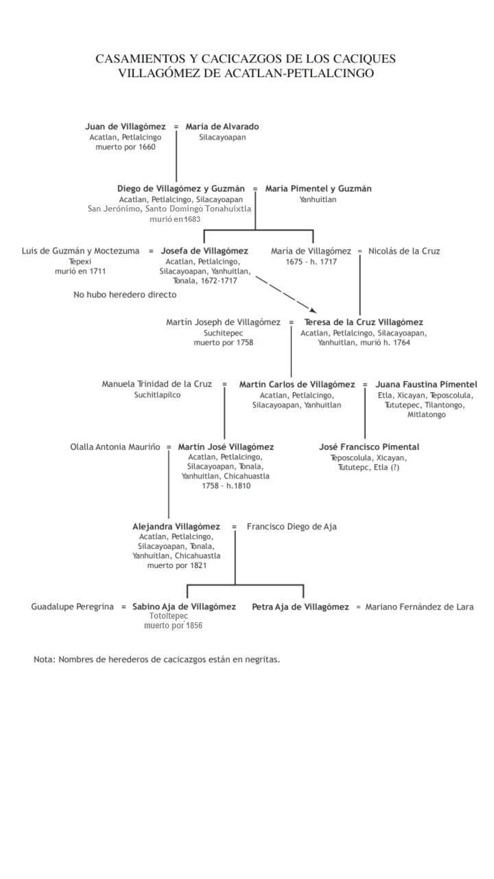 CASAMIENTOS Y CACICAZGOS DE LOS CACIQUES VILLAGÓMEZ DE ACATLAN-PETLALCINGO